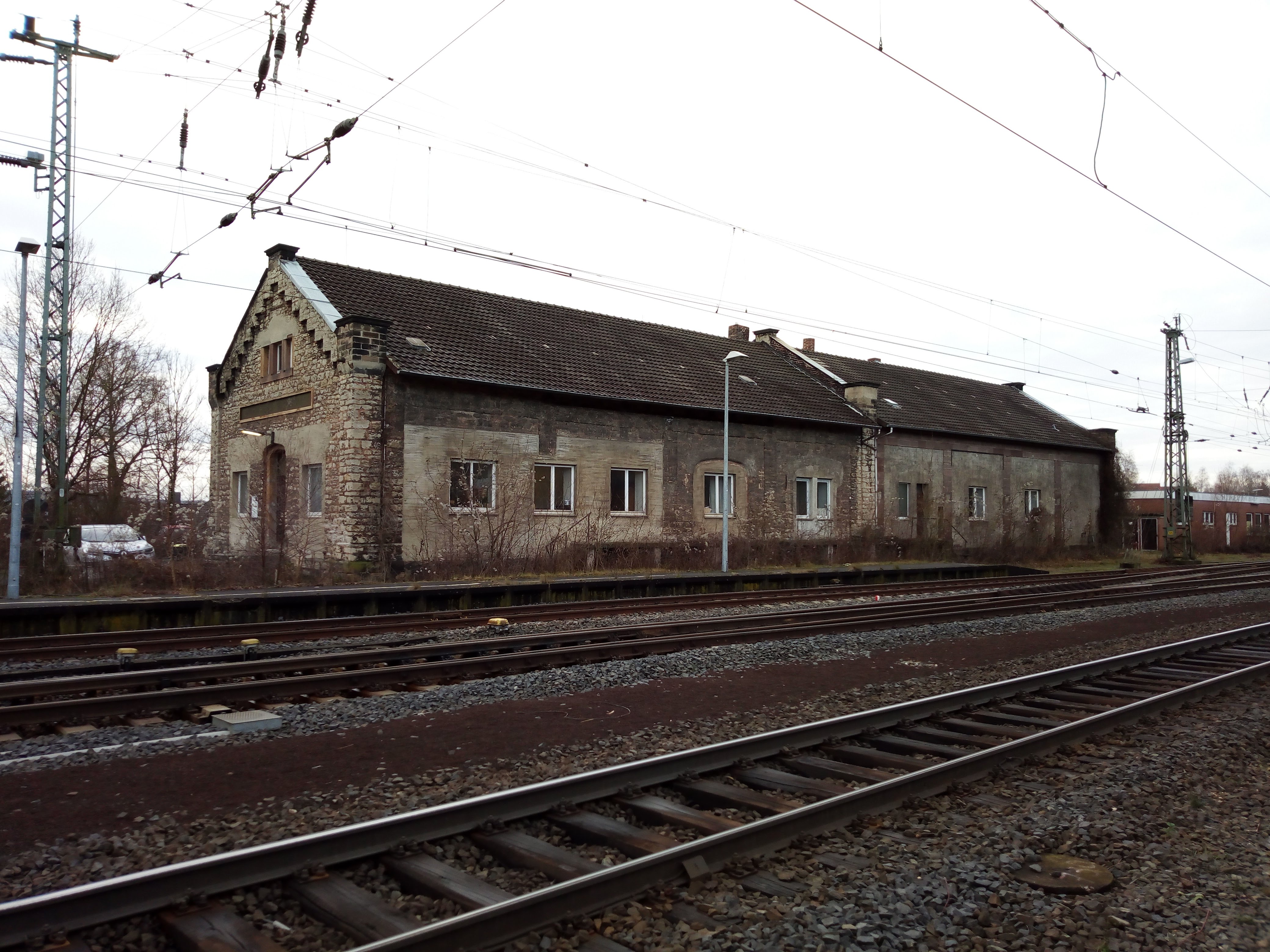 Ehemaliges Bahnbetriebswerk Warburg, Lokschuppen